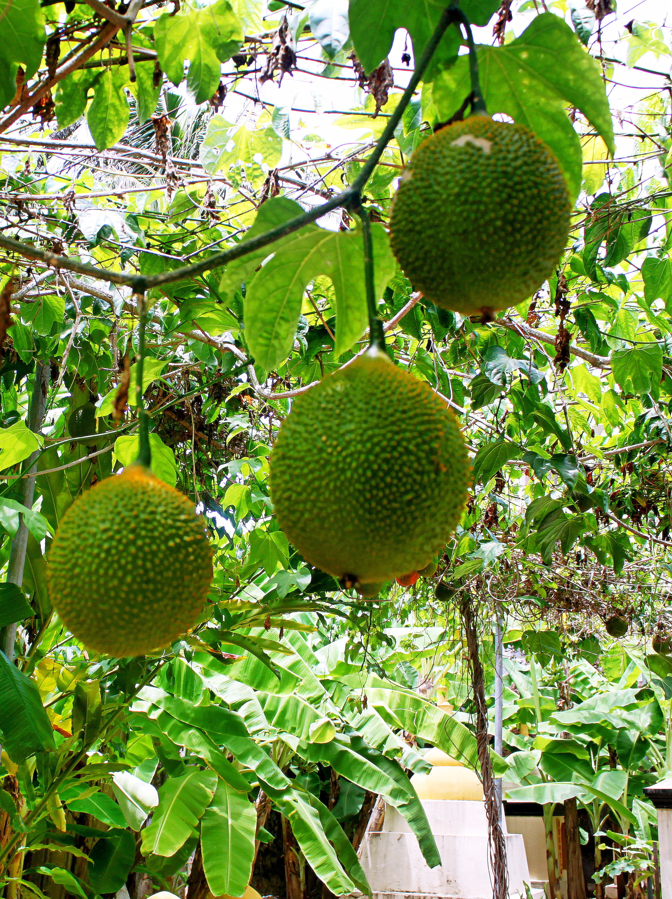 Quả gấc còn xanh